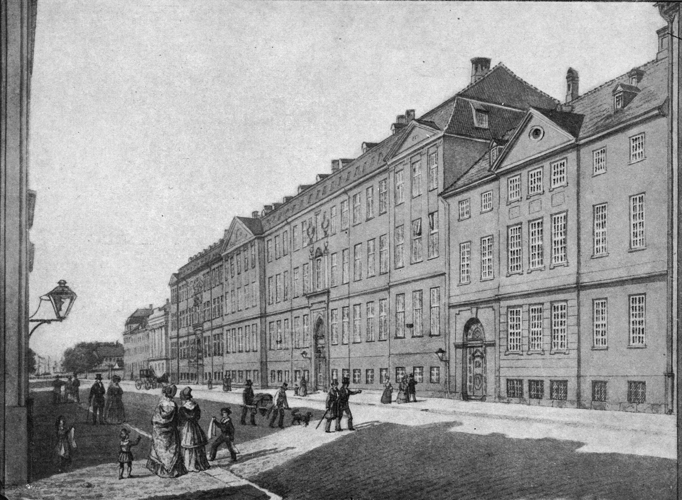 Amaliegade med Almindelig Hospital, set fra hjørnet af Blancogade (nu Fredericiagade) imod Grønningen i 1848